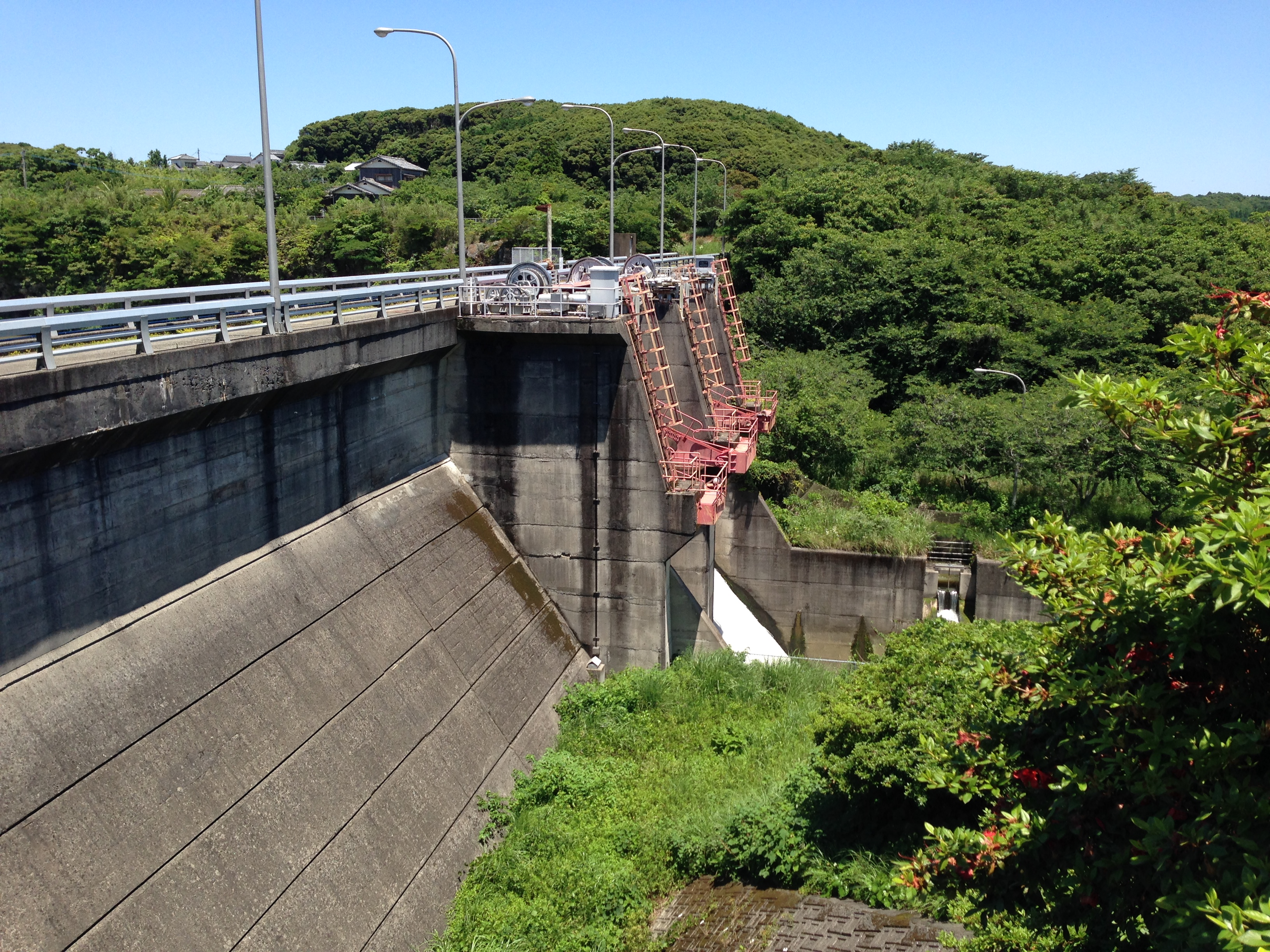 五島市、福江ダム側面